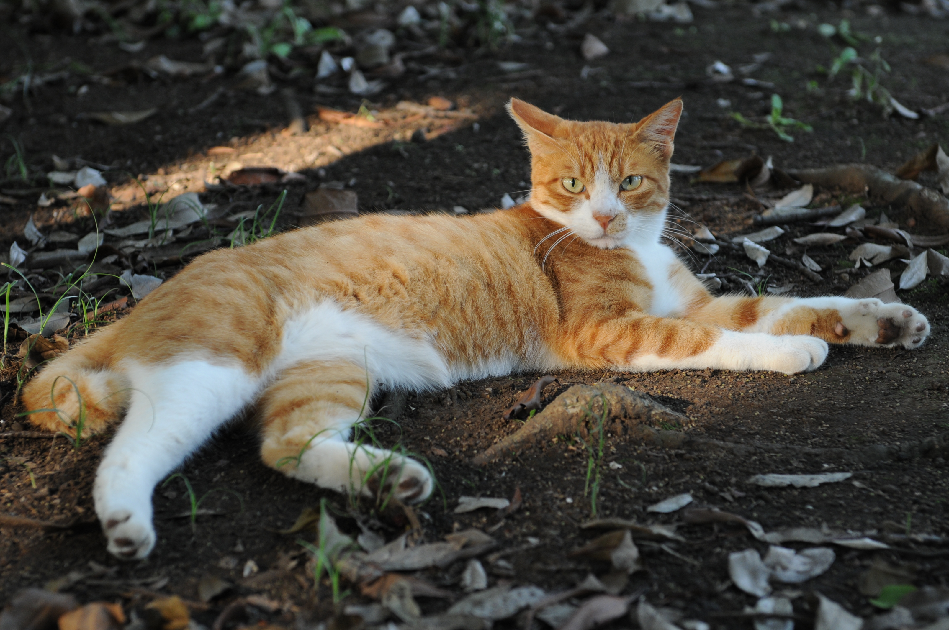 D02_0537